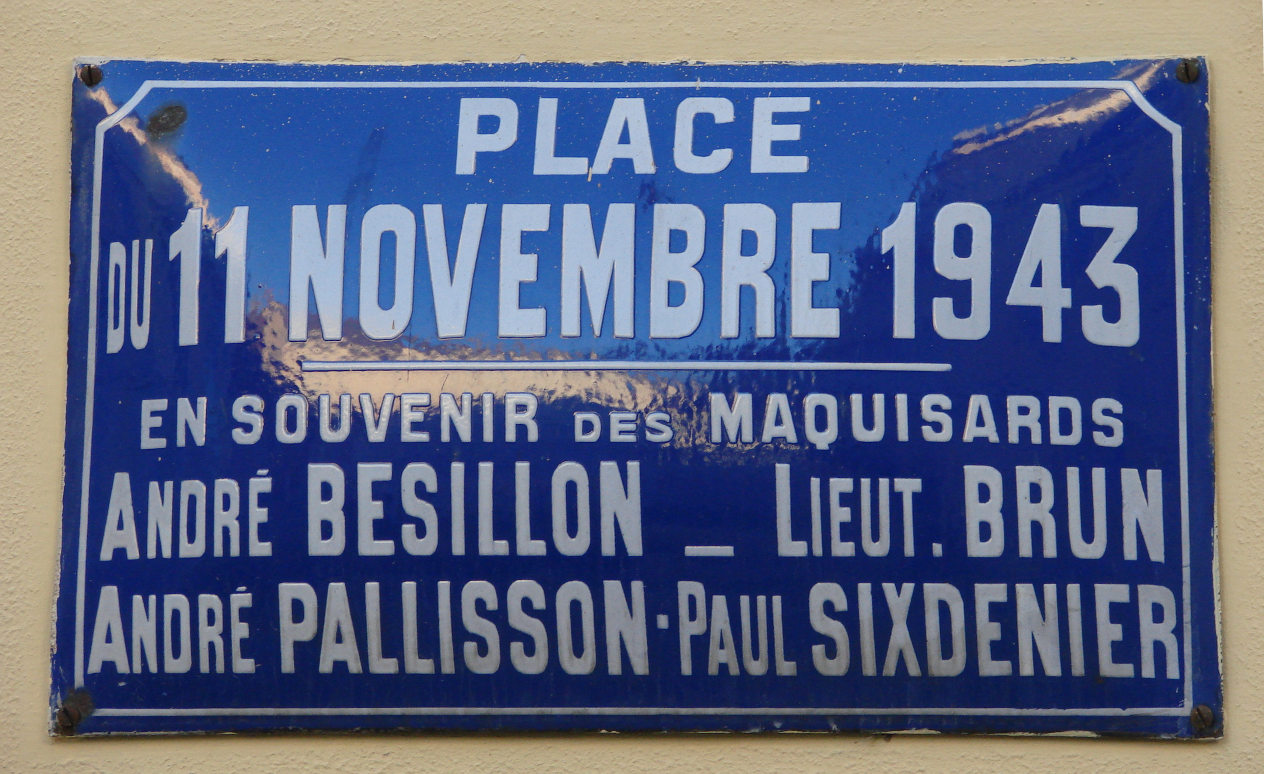 Plaque émaillée: place du 11 novembre 1943 - Oyonnax